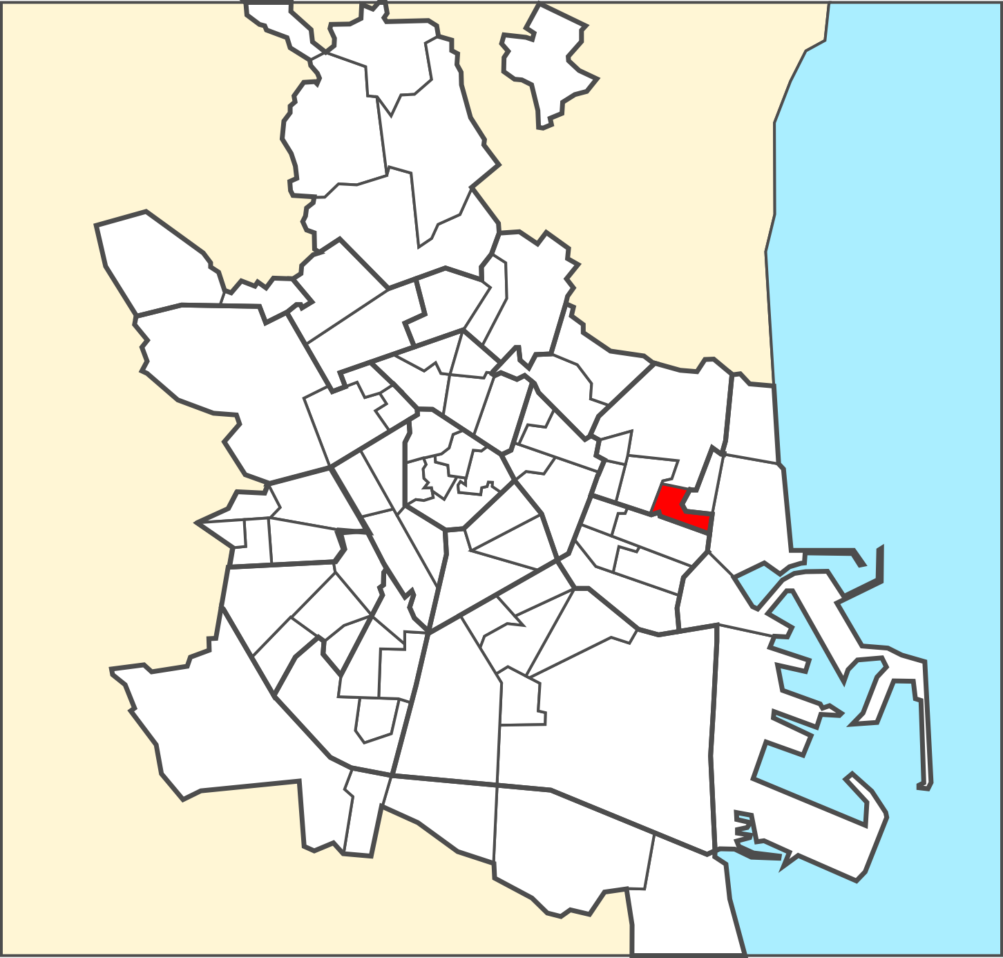 Localització del barri dins de la ciutat de València.